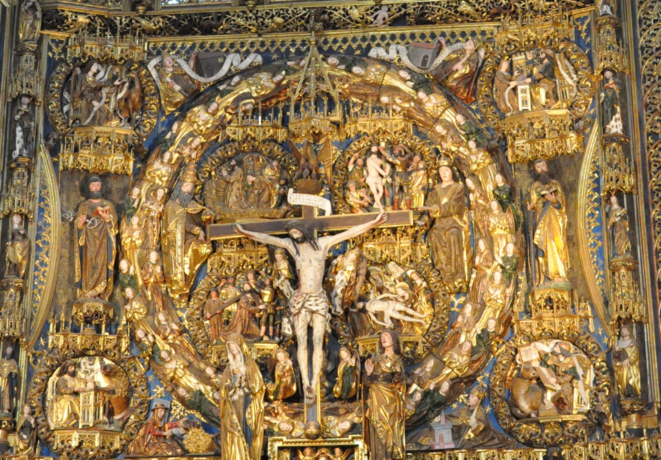 Detalle del Retablo del altar mayor de la Cartuja de Miraflores (Burgos). Obra de Gil de Siloé; policromado por Diego de la Cruz (final s-XV)